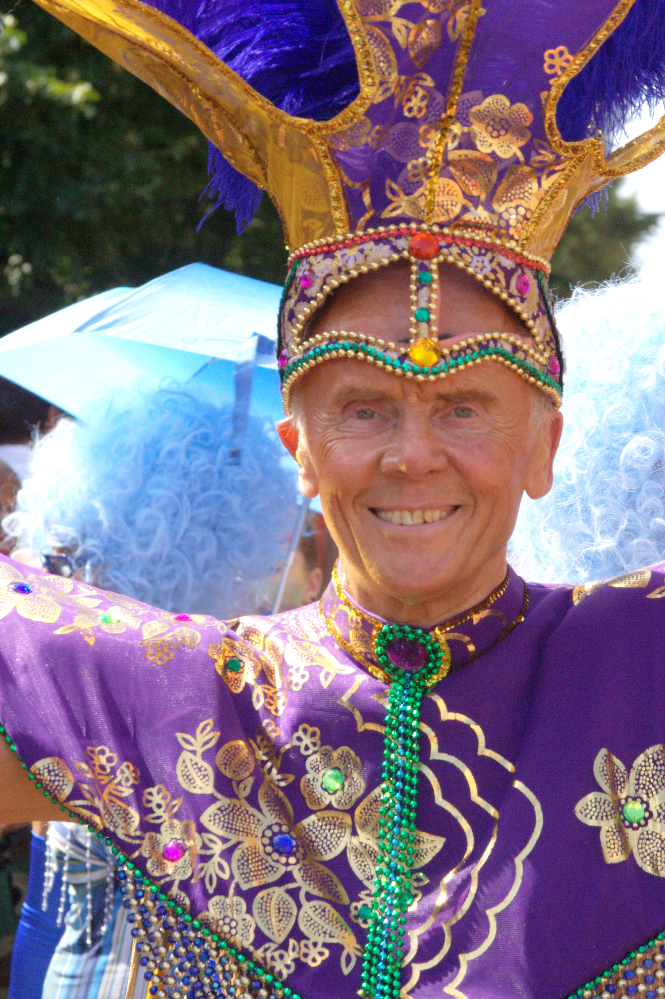 we are pope